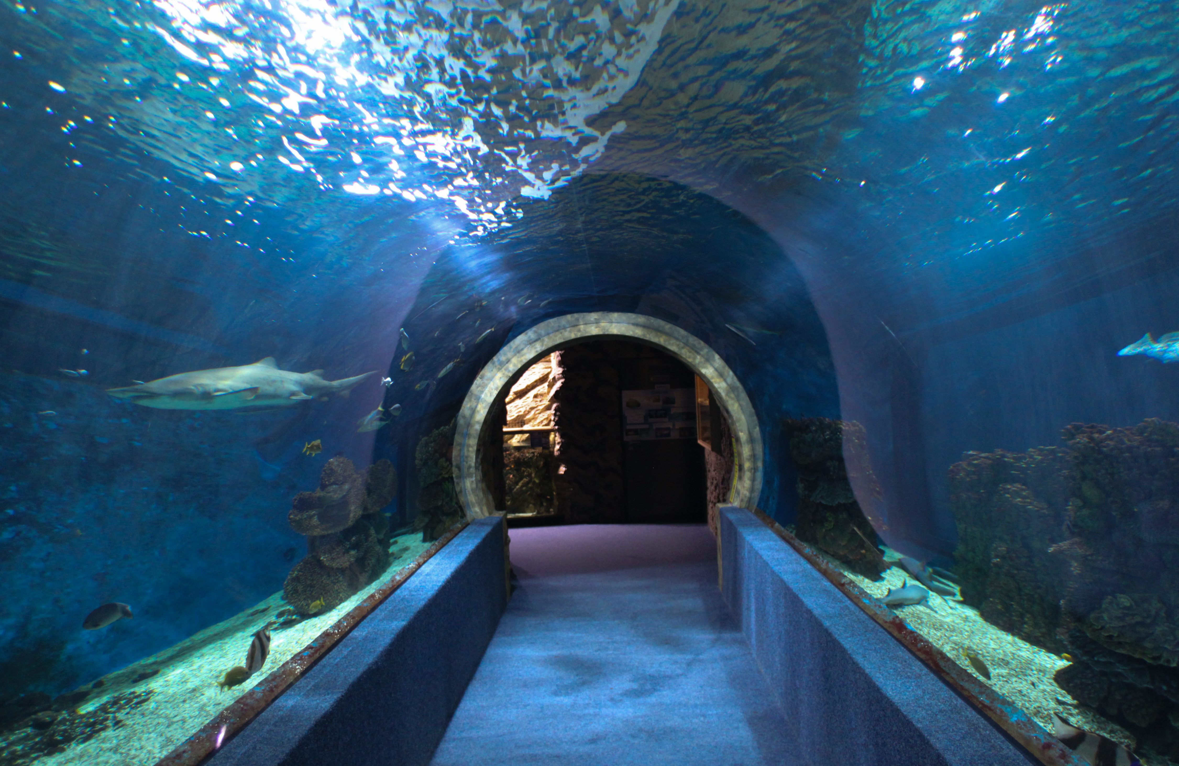 Nyíregyháza Zoo, Aquarium, underwater passagelabel QS:Len,"Nyíregyháza Zoo, Aquarium, underwater passage" label QS:Lhu,"Nyíregyházi Állatpark, ócenárium"